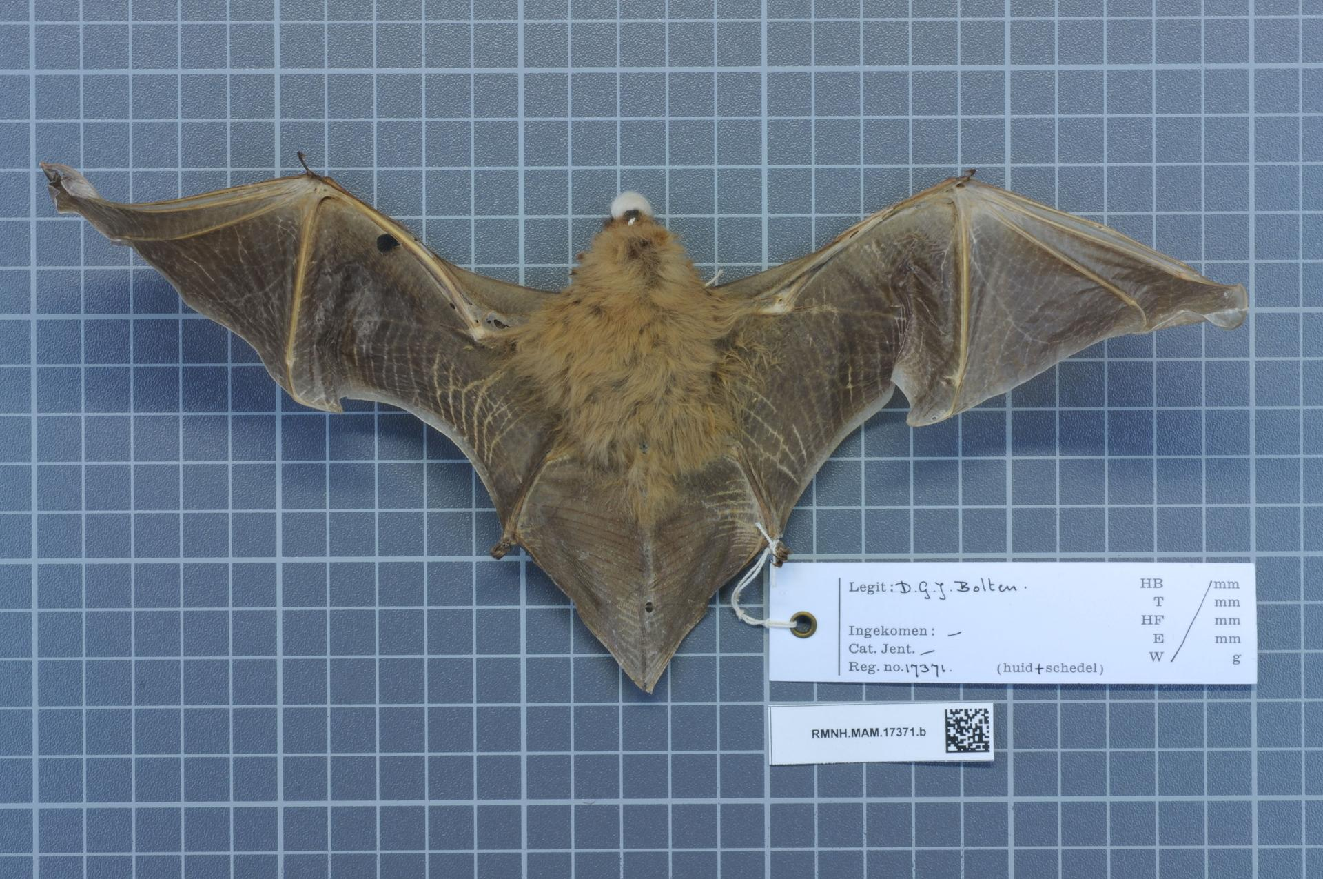 lasiurus Ega Ega